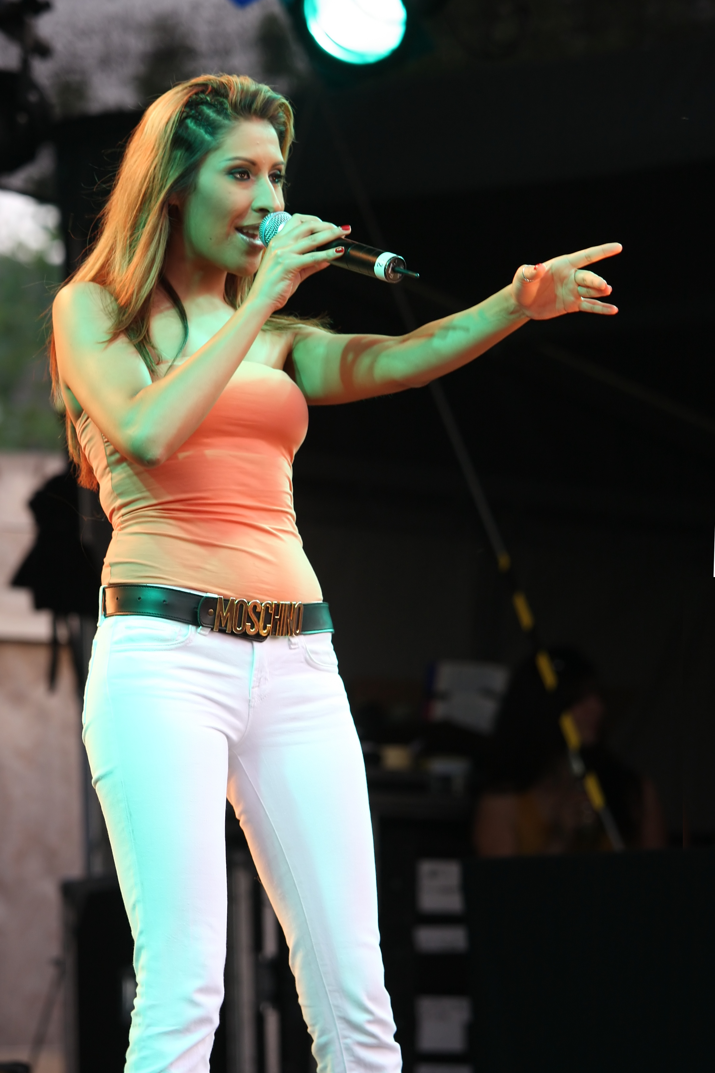 Die Gruppe „Monrose“ - Senna Guemmour - auf der Hauptbühne auf dem Heumarkt, Köln. Bühnenprogramm zum CSD-Straßenfest/ColognePride 2009.